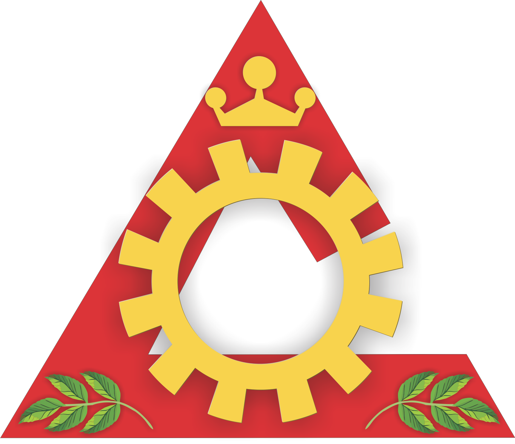 Brasao do Município de Cataguases, Minas Gerais, Brasil